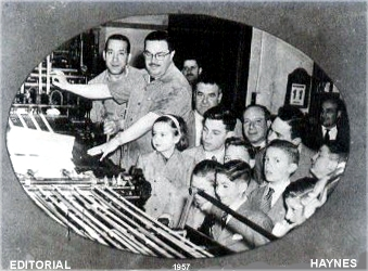 Fotografía durante una visita a la Editorial Haynes, de parte de estudiantes secundarios en el año 1957.